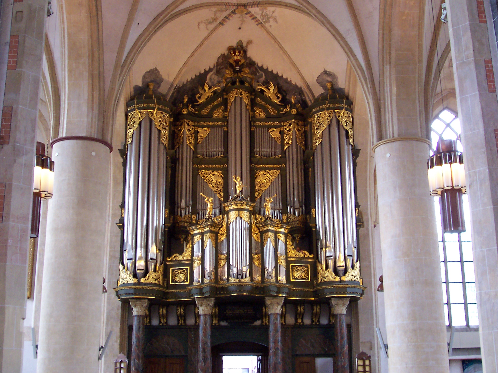 Het orgel van de Martinikerk in Groningen